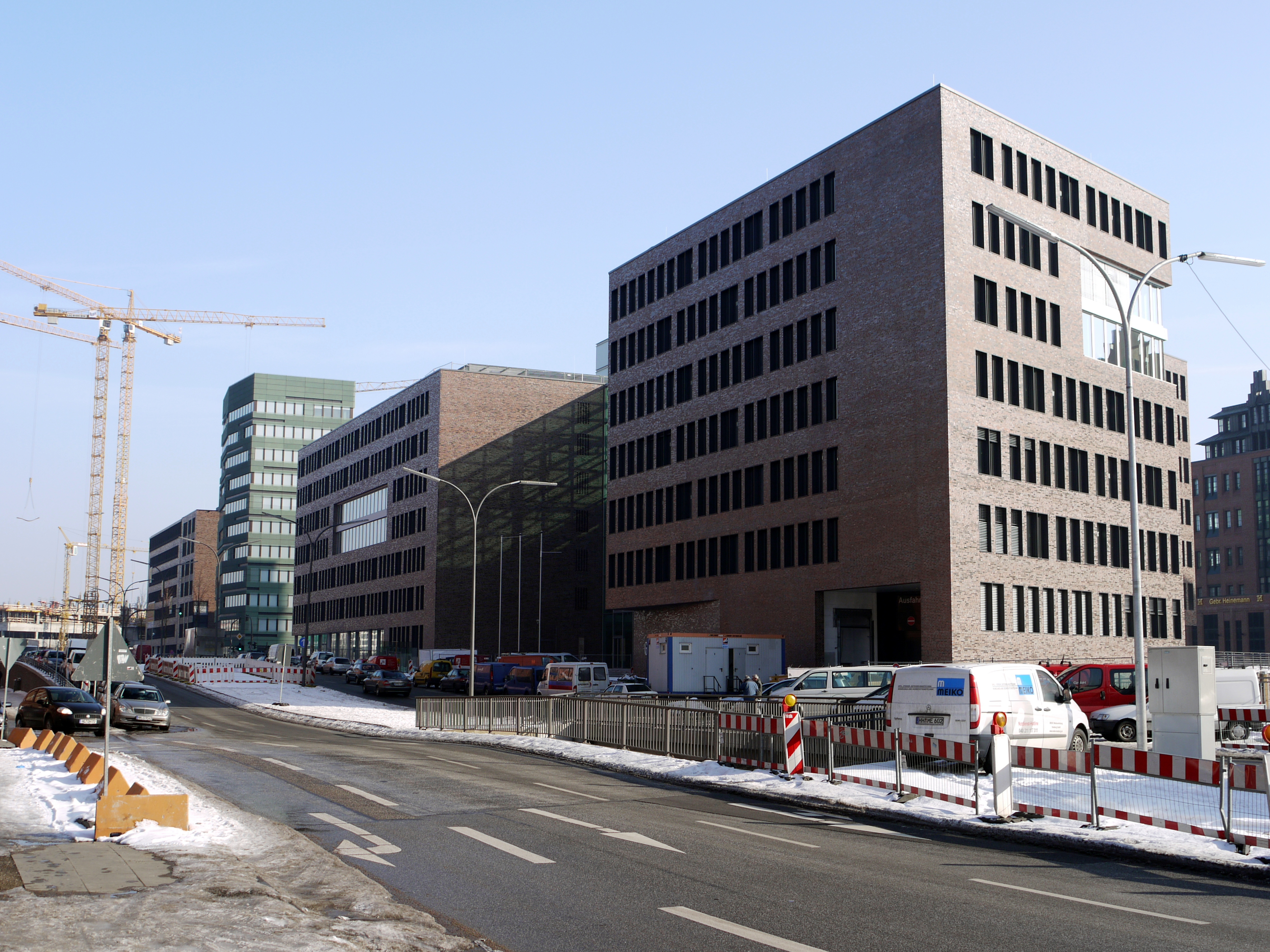 Bebauung des Brooktorkais in der HafenCity in Hamburg, Straßenseite.